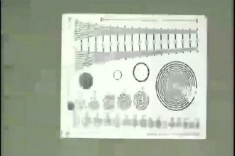 Compresión realizada con el códec Cinepk.